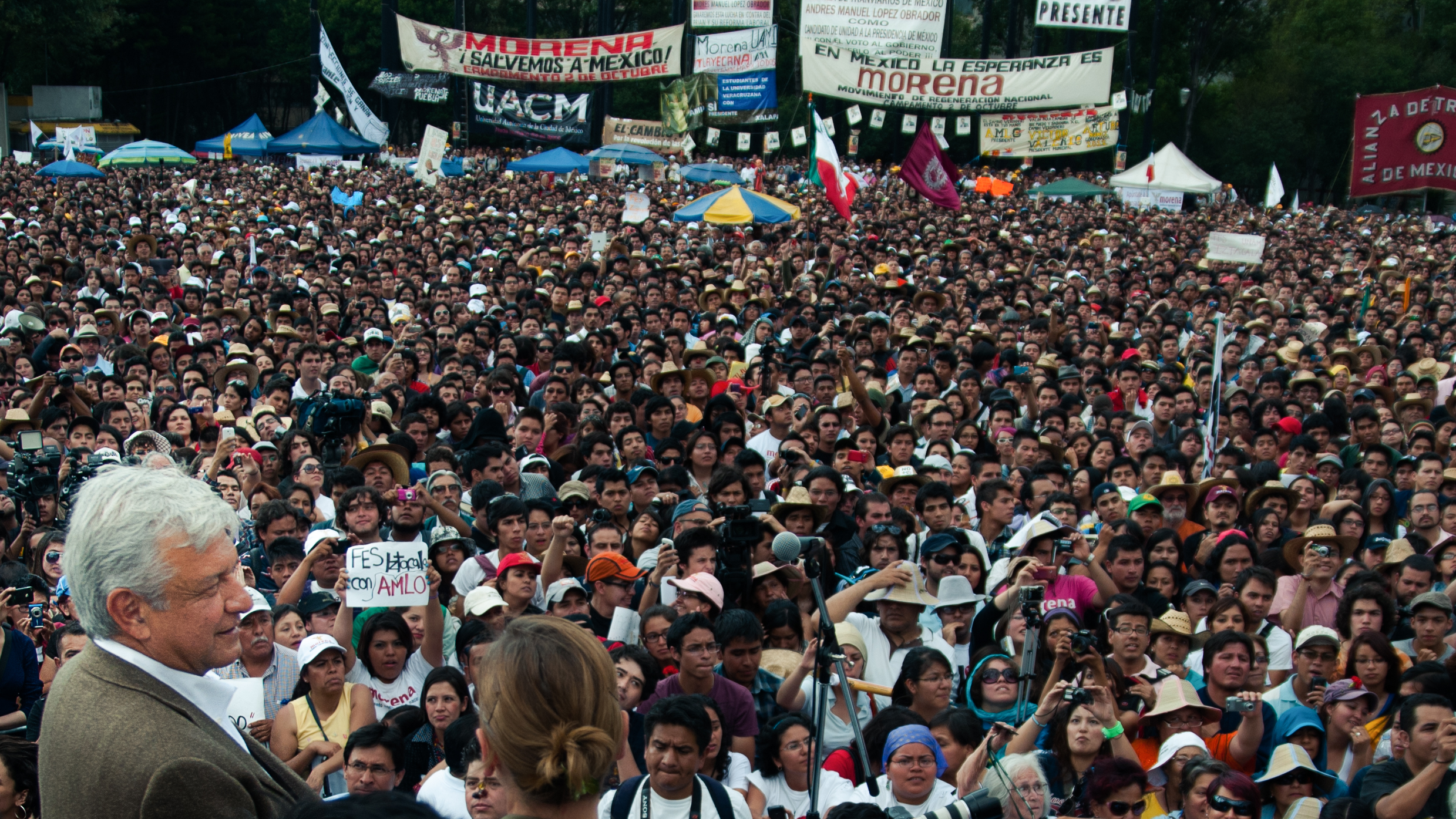 AMLO se reunió con Universitarios en la plaza de Tlatelolco, que lució abarrotada.